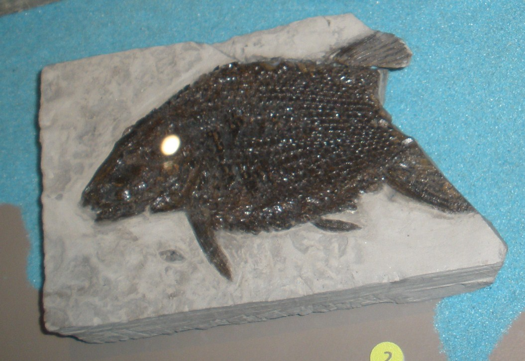 Fossil of Lepidotes, an extinct fish Took the photo at Musee d'Histoire Naturelle, Brussels